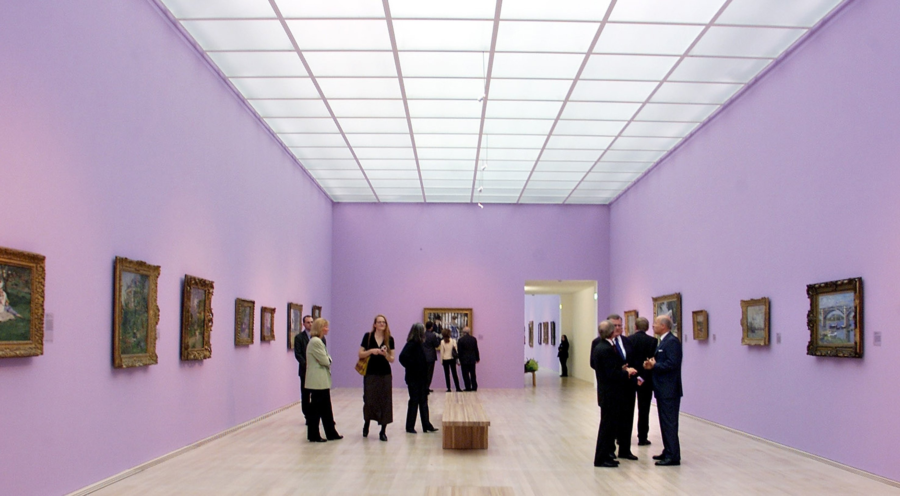 Einer der neuen Säle des Erweiterungsbaus der Staatsgalerie Stuttgart von Wilfrid und Katharina Steib, die mit der Ausstellung "Edouard Manet und der Impressionismus" am 20. September 2002 der Öffentlichkeit übergeben wurden: vorne links die Ausstellungskuratorin Ina Conzen und ihre Mitarbeiterin Kathrin Elvers-Svamberk